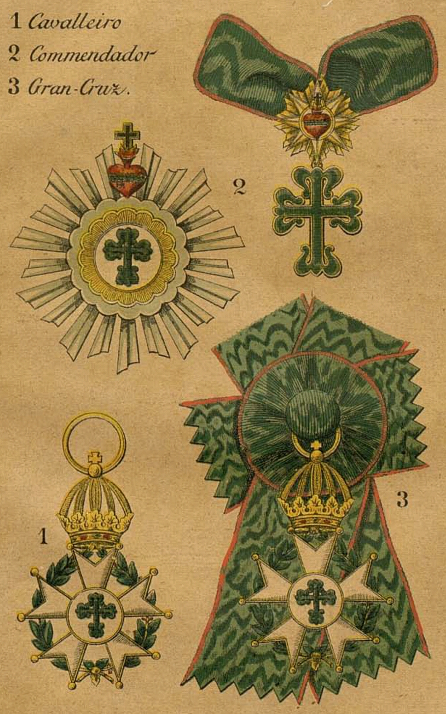 Brazylijski Cesarski Order Aviz